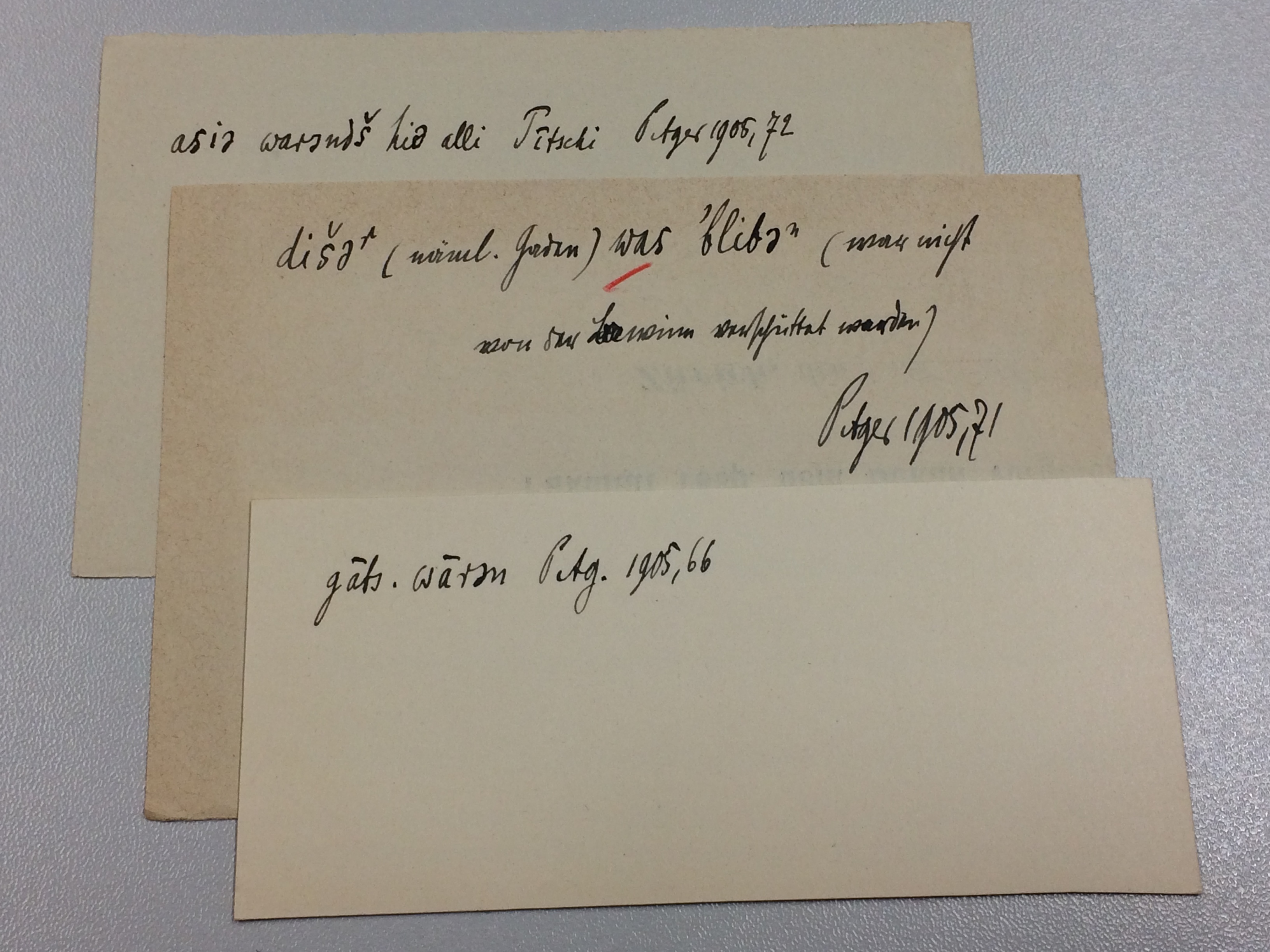 Eduard Schwyzers Aufzeichnungen des Präteritums im höchstalemannischen Dialekt von Agaro (Piemont) 1905